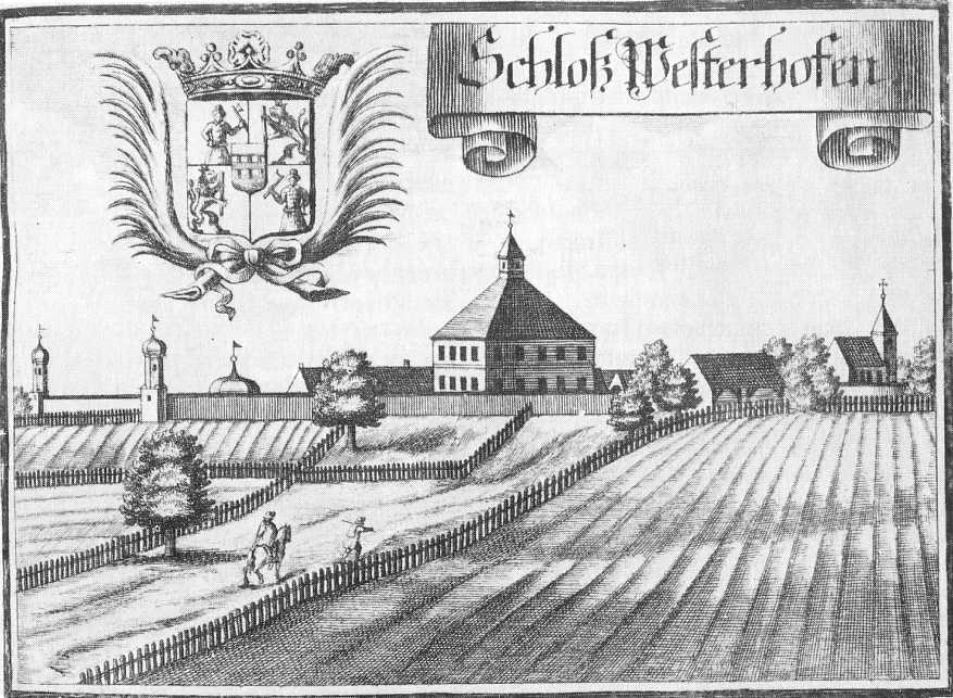 Schloss Westerhofen nördlich von Ingolstadt. Kupferstich von Michael Wening, 1701